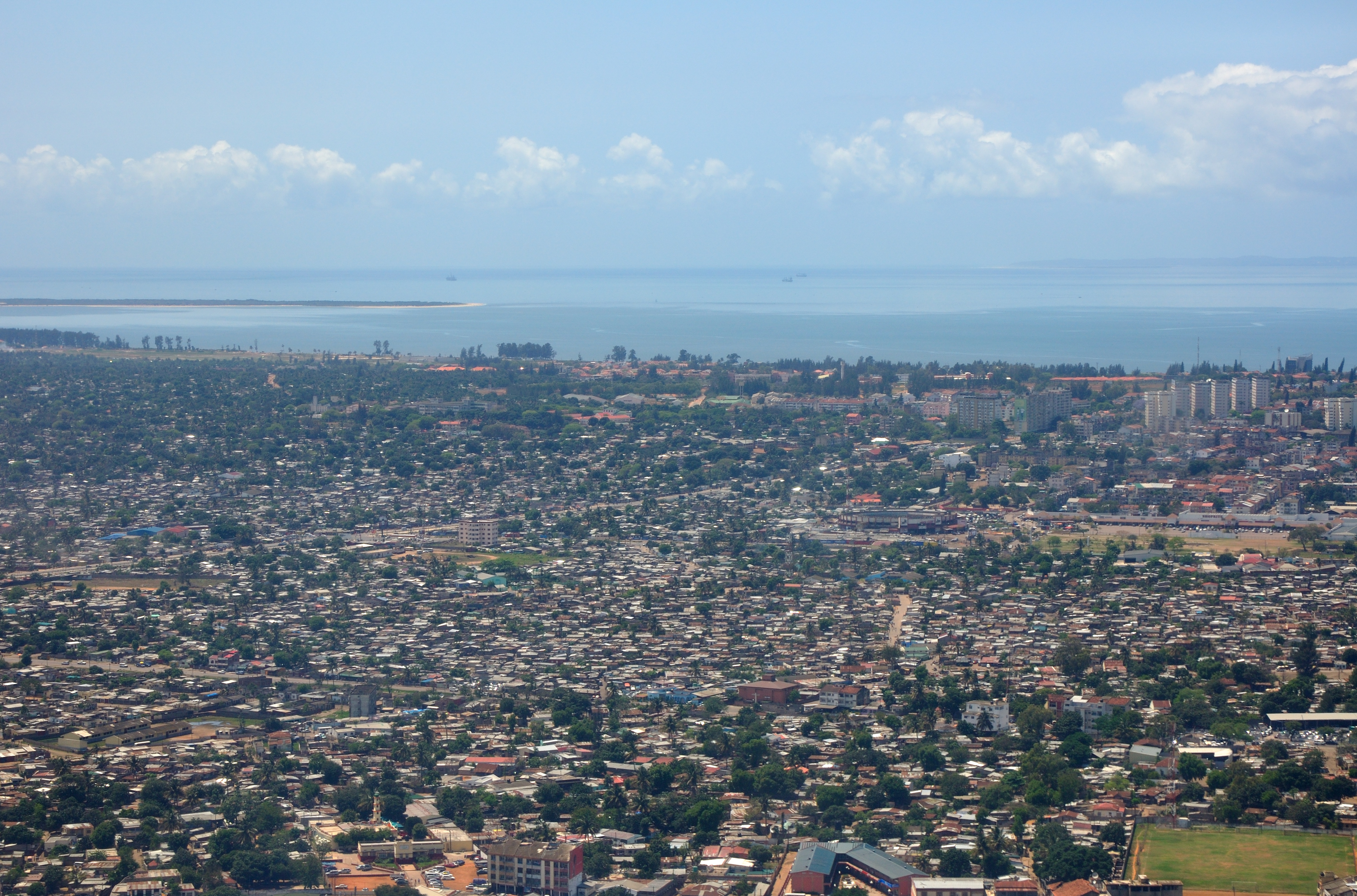 Mozambique, approach into Maputo